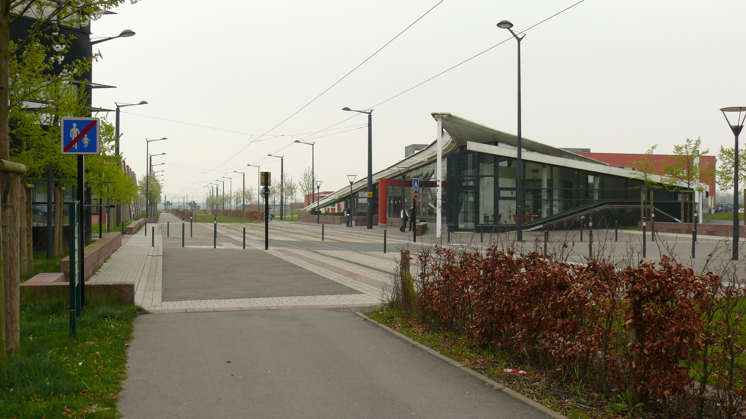 Tramway de Valenciennes : Le tramway structure le campus de l'Université de Valenciennes à Famars, ici devant le restaurant universitaire, à la station Moriamez Recherche